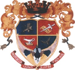 El escudo de Piedecuesta fue realizado por el pintor Luis Antonio Céspedes Mantilla, nacido aquí. Fue entregado al Concejo Municipal en 1941, siendo Presidente del Cabildo el señor Aníbal Rey Mantilla. El original del escudo se encuentra en la secretaria General del Comando de Policía de la Ciudad.